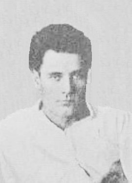 Яков Иванович Тряпицын (1897 - 1920 гг.). Командующий Николаевским фронтом Красной Армии РСФСР.